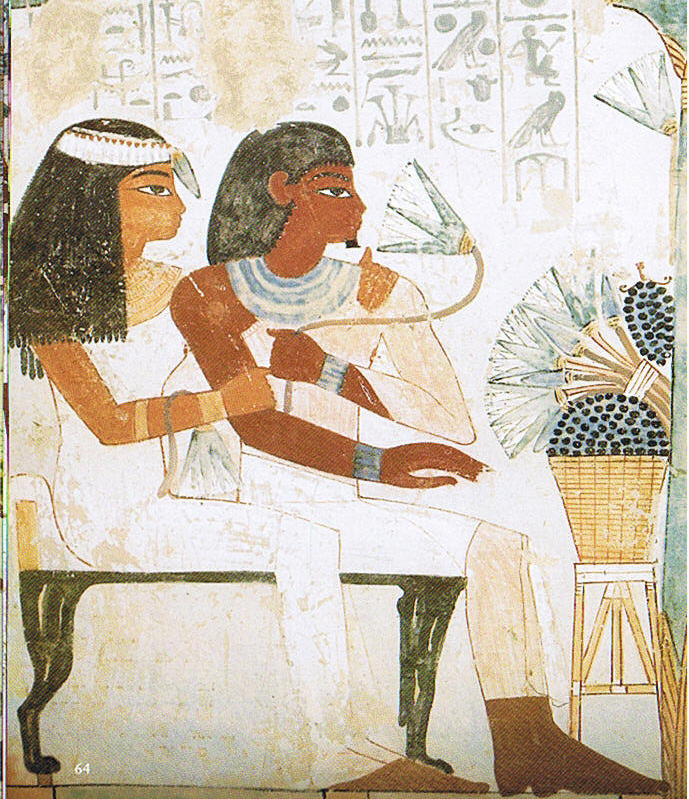 Nacht und Taui